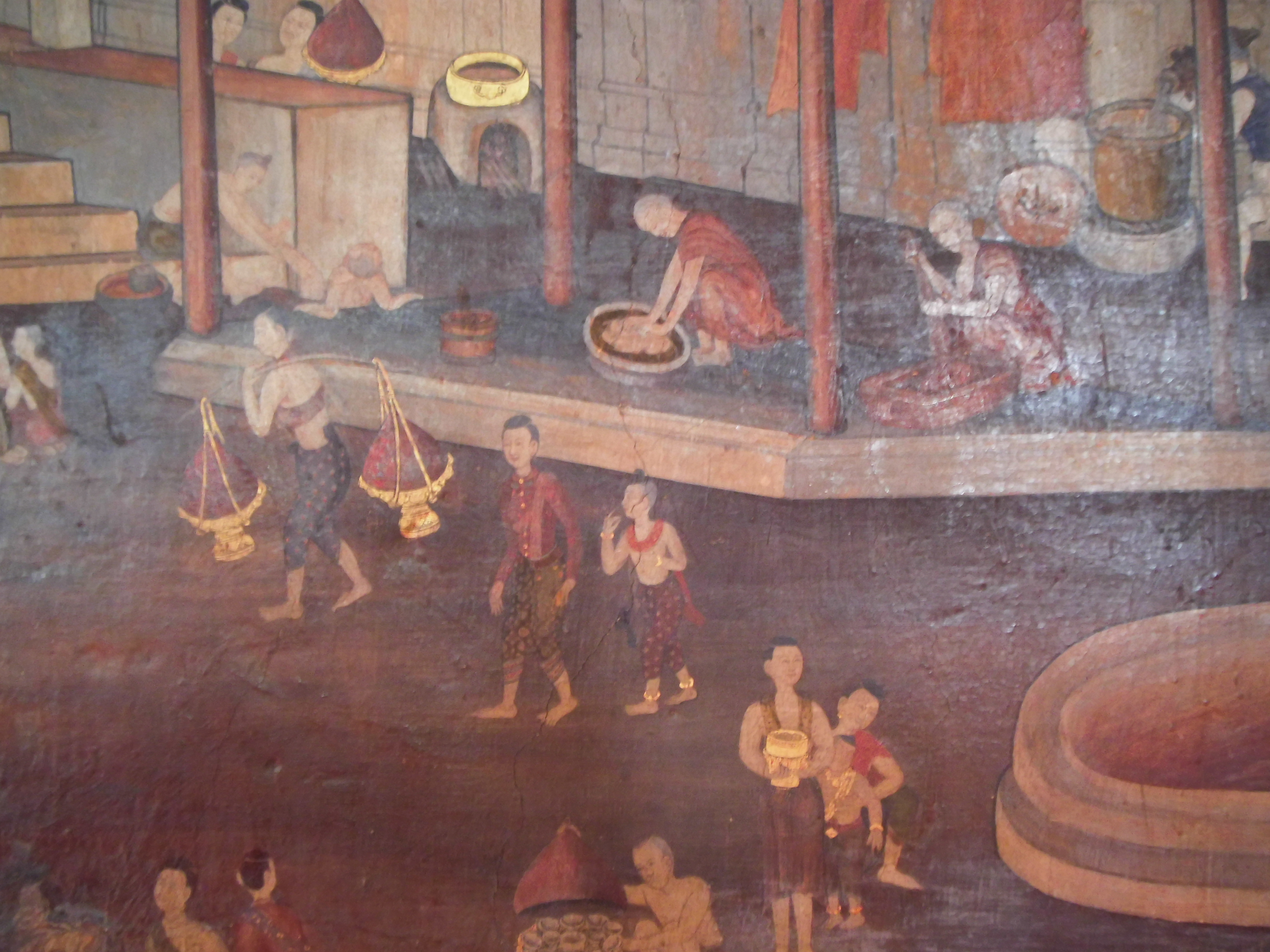 วัดมหาพฤฒาราม